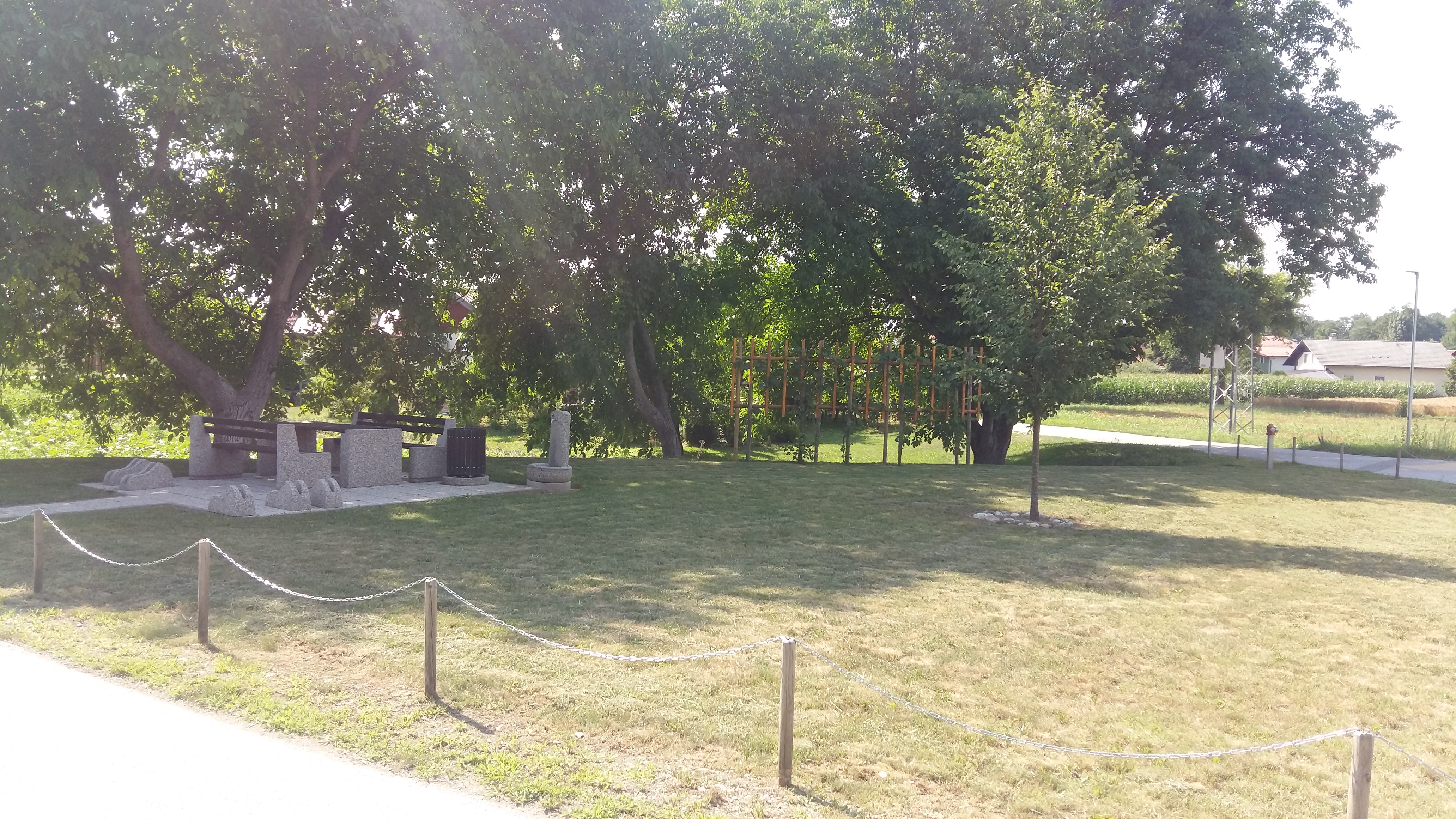 Počivališče Hajdoše